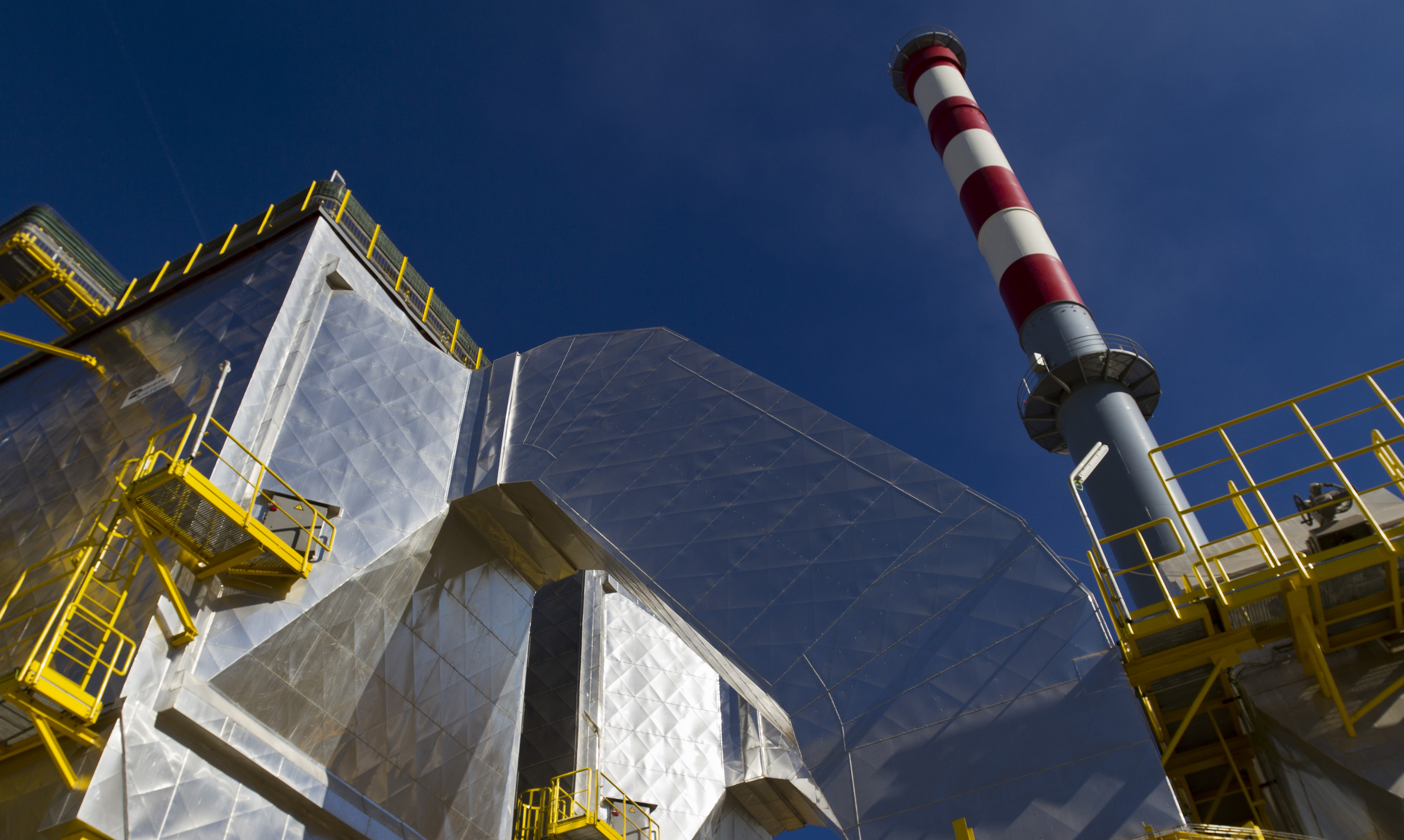 Desde 2012 está en marcha en el complejo onubense de Ence la planta de generación de energía con biomasa de 50 MW, la más importante de España y una de las principales de Europa. La planta consume unas 500.000 toneladas de biomasa al año para producir 180 toneladas/hora de vapor a 100 bares de presión y 500ºC de temperatura, y que es la energía térmica que permite a la turbina producir más de 400 millones de kWh/año. Huelva 50 MW ha sido construida con las Mejores Técnicas Disponibles recomendadas por la UE para el transporte, almacenamiento y producción de energía con biomasa. Entre estas técnicas está el sistema de reducción selectiva no catalítica, que permite reducir emisiones de óxido de nitrógeno. La apuesta por la tecnología de lecho fluido para la caldera, el uso de gas natural como combustible auxiliar para operaciones puntuales, o la incorporación de un eficaz precipitador electroestático para la captación de gases de combustión a la salida de la caldera también permiten a Ence cumplir con su objetivo de minimizar el impacto ambiental de sus operaciones.